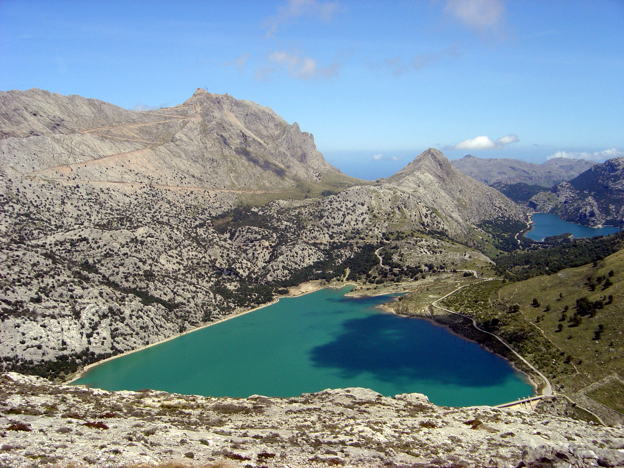 Embassament de Cúber, vist des de Sa Rateta. Escorca. Mallorca (Espanya).